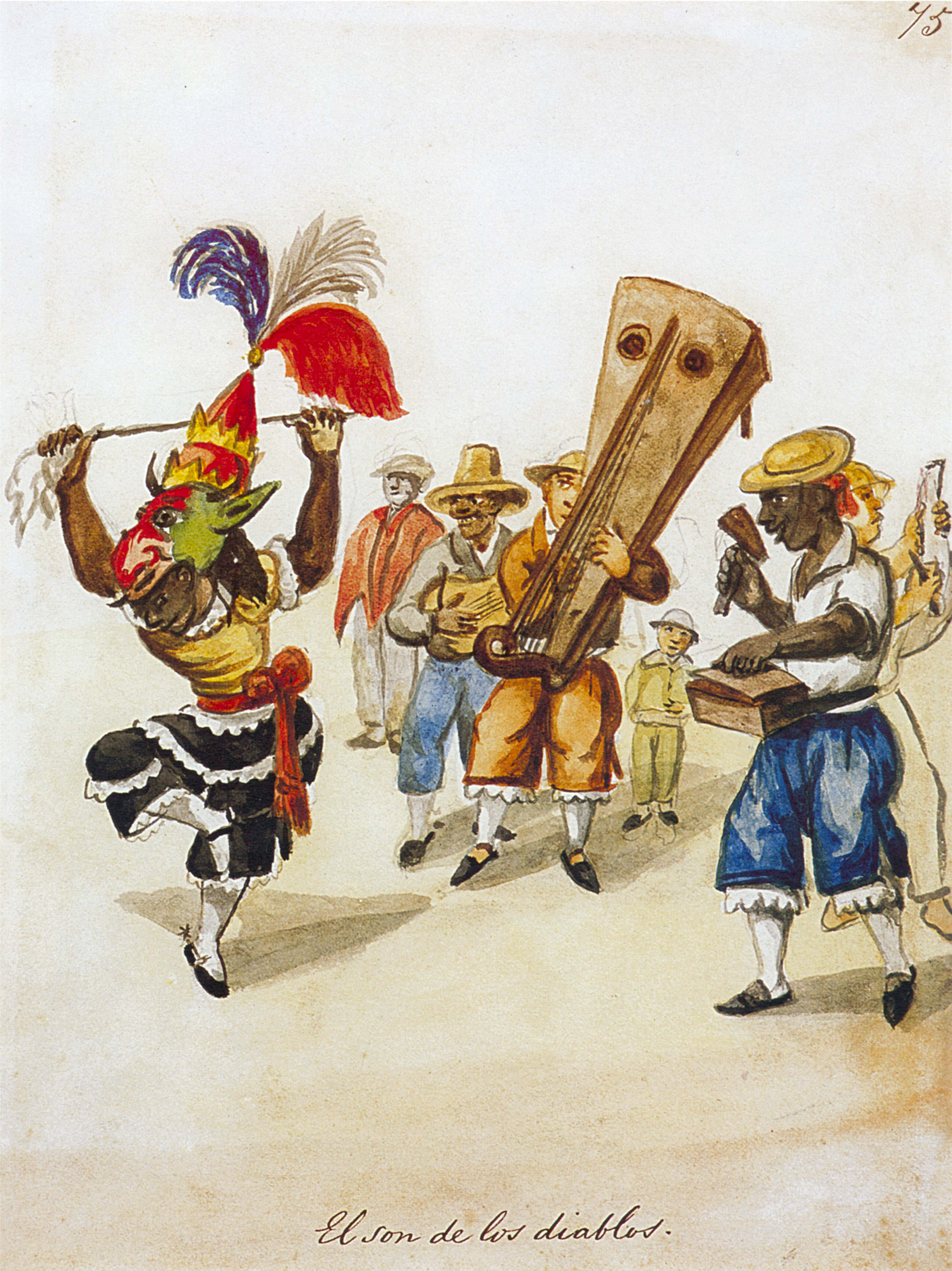 Acuarela de Pancho Fierro (Lima, 1807 - Lima, 1879)